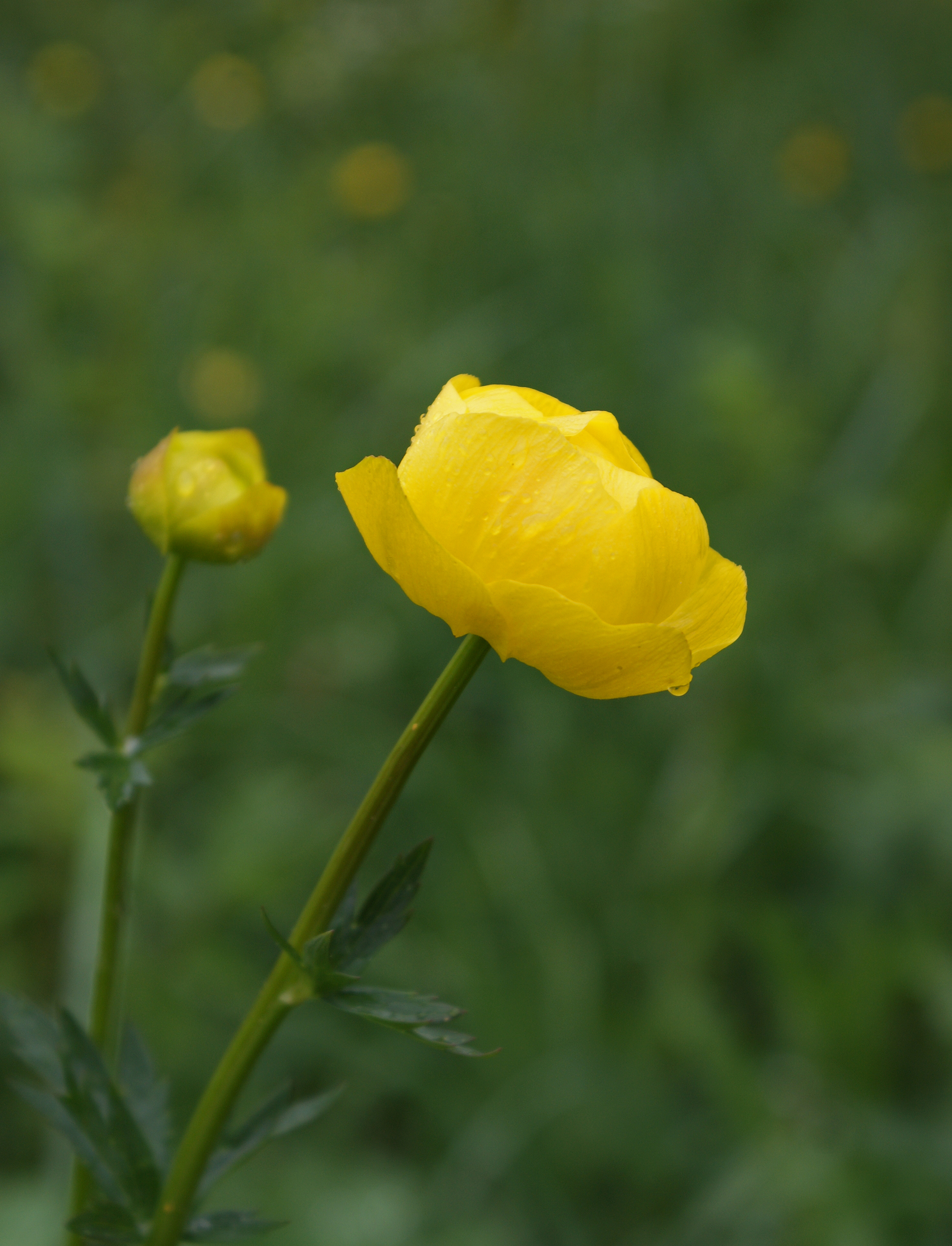 Ballblom - Globeflower - Trollius europaeus